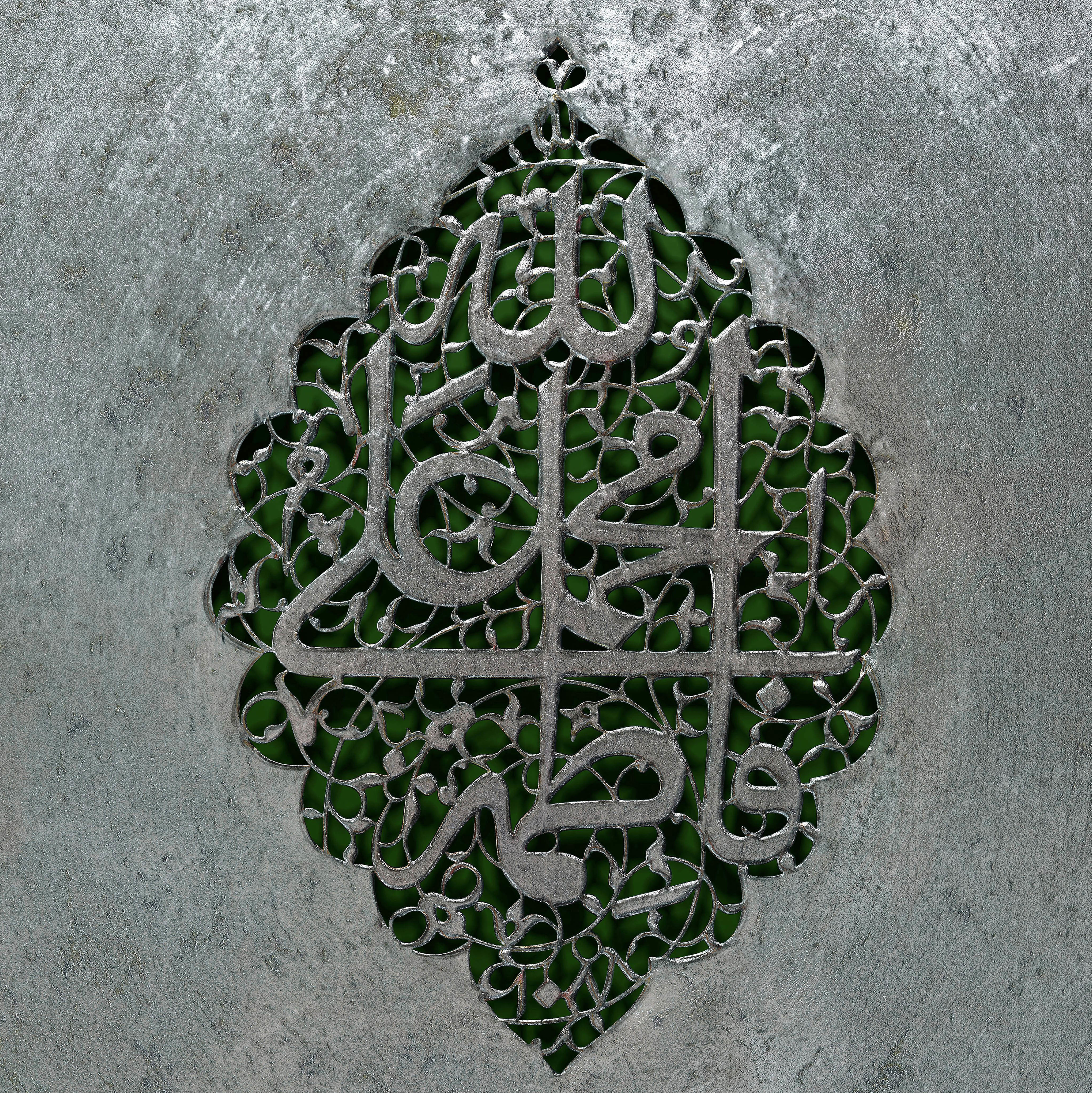 الله (جل جلاله) محمد (ص) علی (ع) فاطمه (س) مشبک فلزی دورهٔ صفوی بازسازی در کانون هنر شیعی. سال ۱۳۹۵